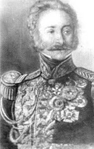 Il generale Paolo Crescenzo Martino Avitabile, in una stampa di epoca borbonica.